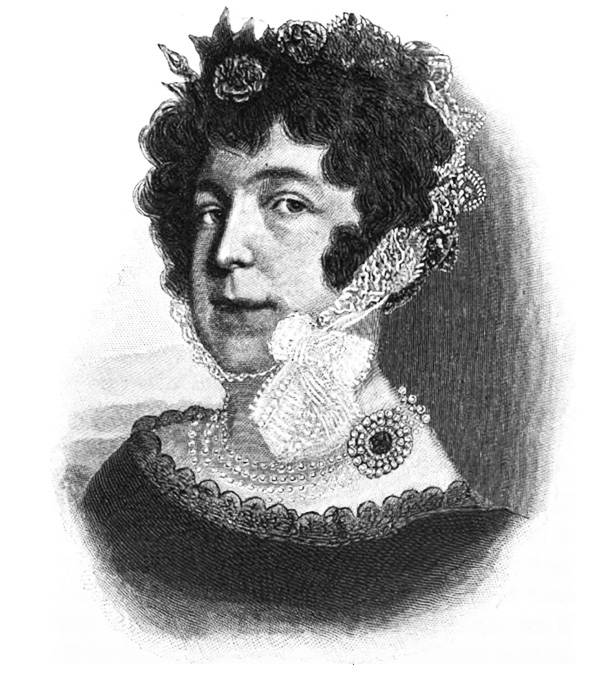 Gustafa Hjärne